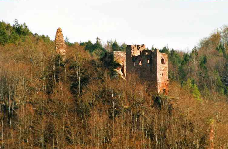 Der Wasigenstein;zwei Burgen auf einem Felsen. Erbaut im 12. und 13. Jahrhundert.